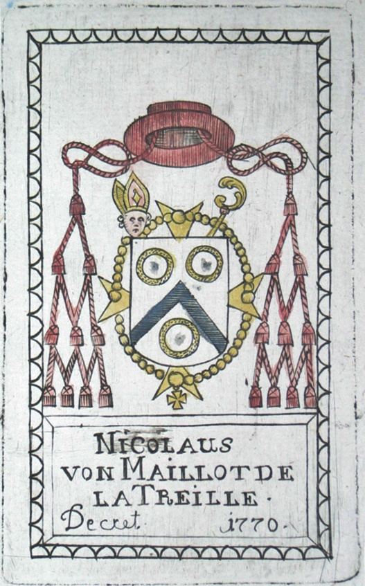 Wappen Nicolas Maillot de la Treille päpstlicher Prälat und kurpfälzischer Hofkaplan, mit dem Stammwappen der Familie Maillot de la Treille